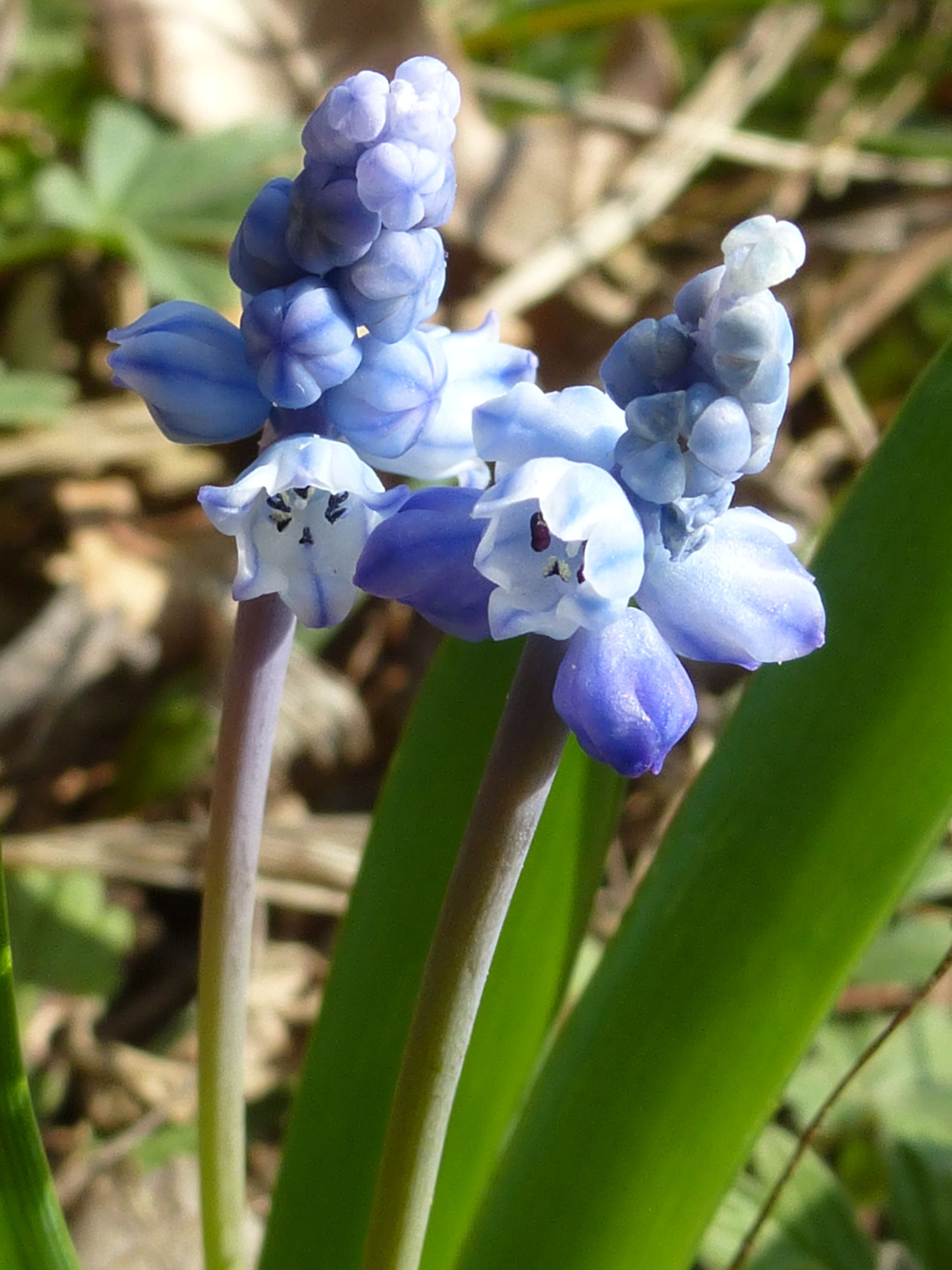 Himmelblaue Traubenhyazinthe (Muscari azureum), Fundort: Pfaffstätten (Niederösterreich)